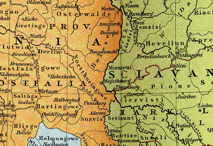 Heiliges Römisches Reich um 1000, Ausschnitt Nordthüringgau